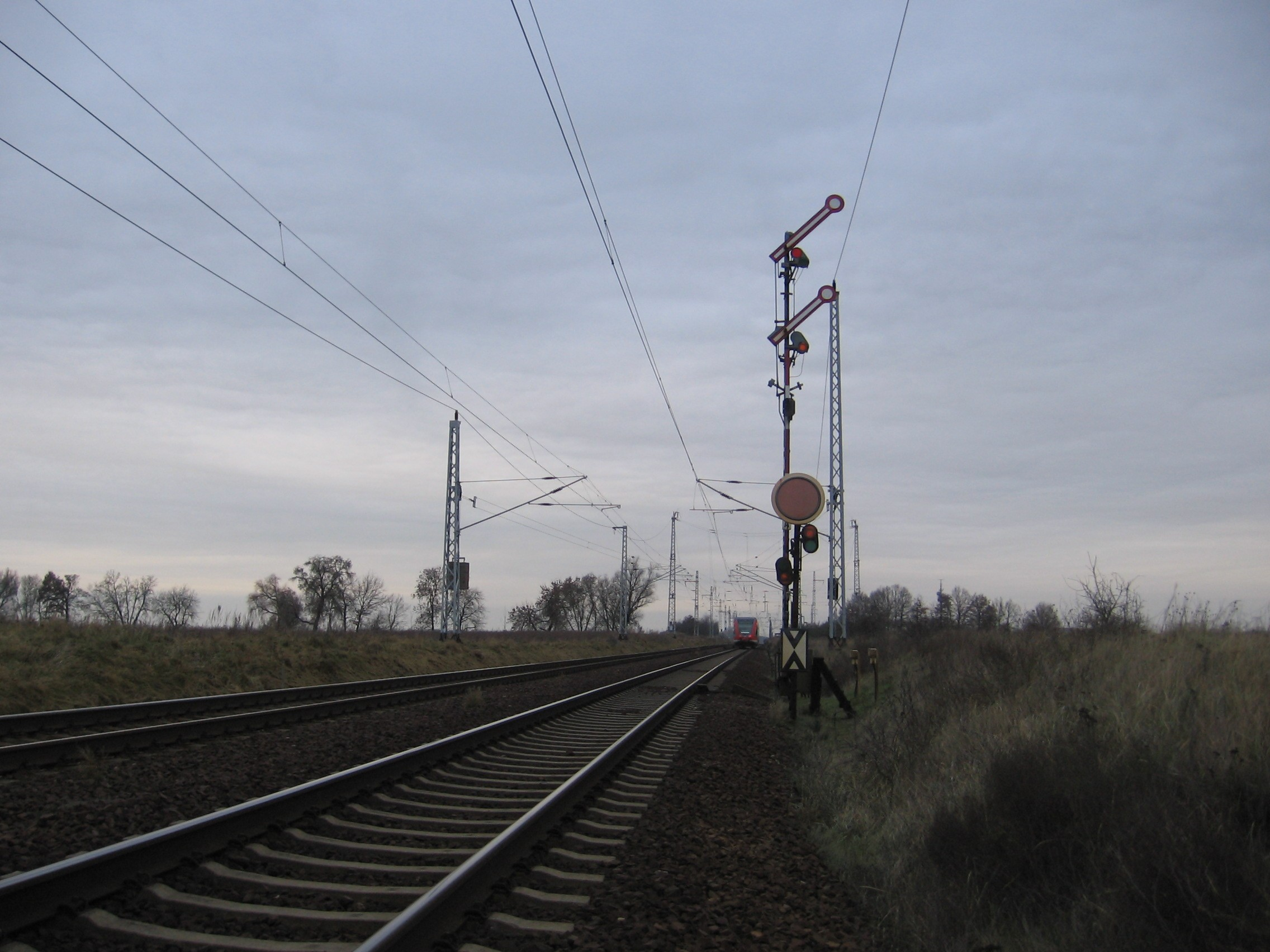 Berliner Nordbahn, Bf. Löwenberg, südliche Einfahrt